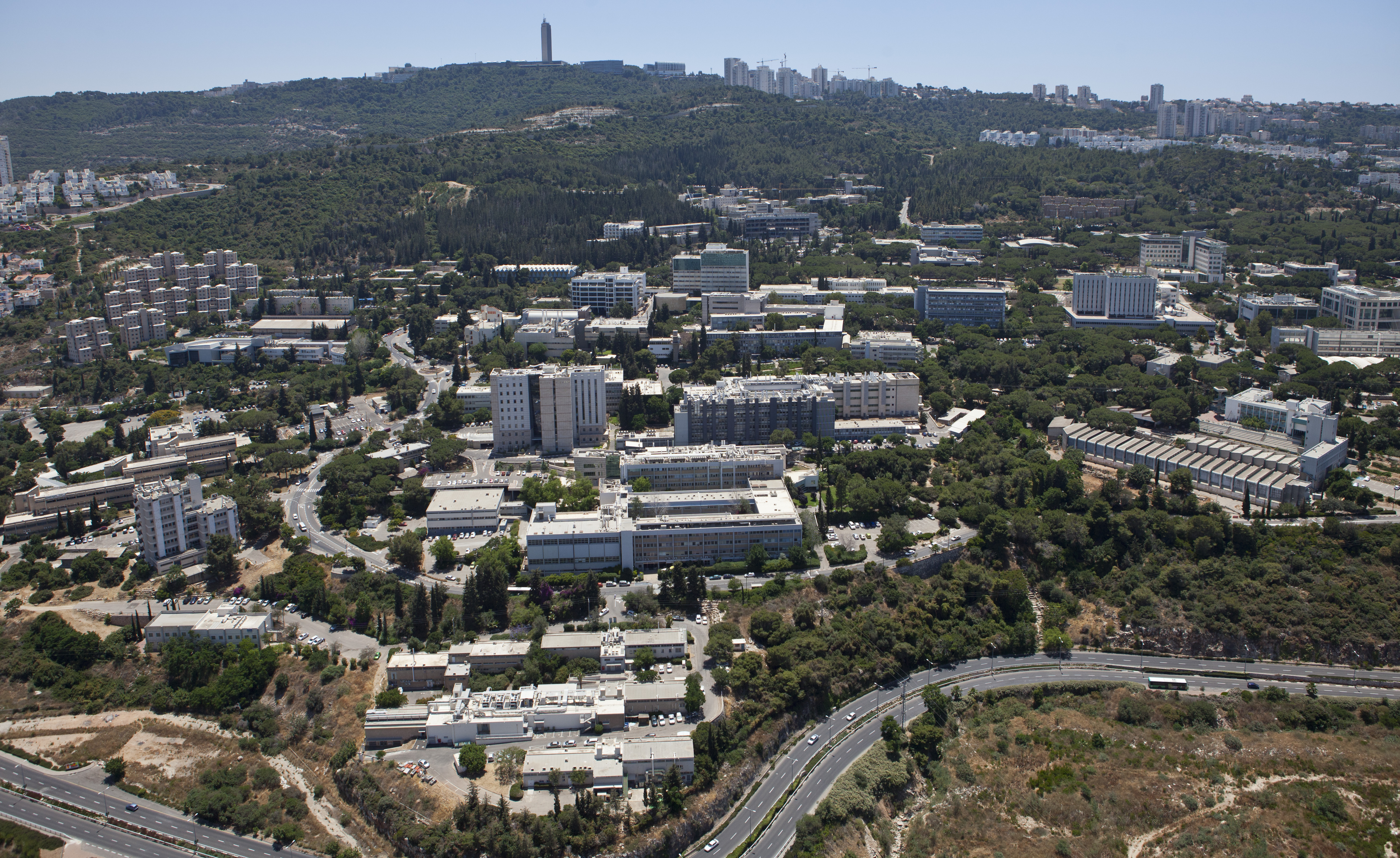 Le Technion